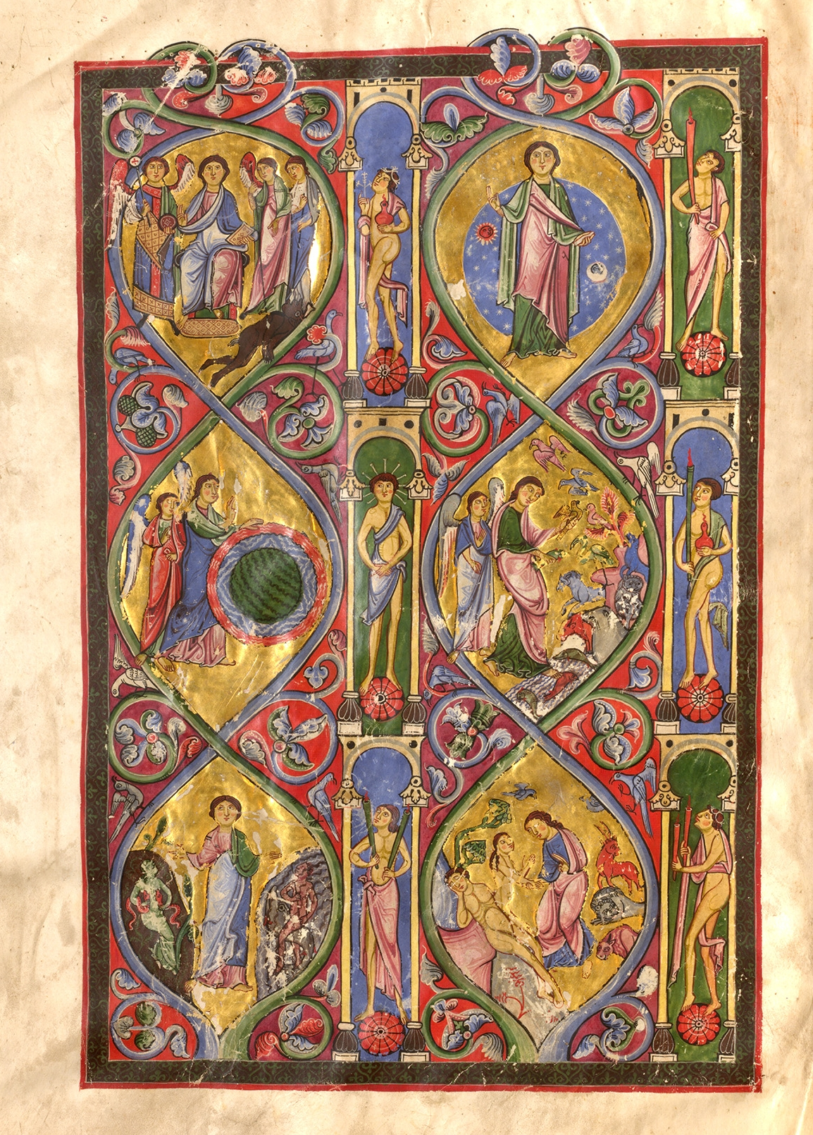 Gumbertusbibel Bl. 5v, UB Erlangen Ms. 1